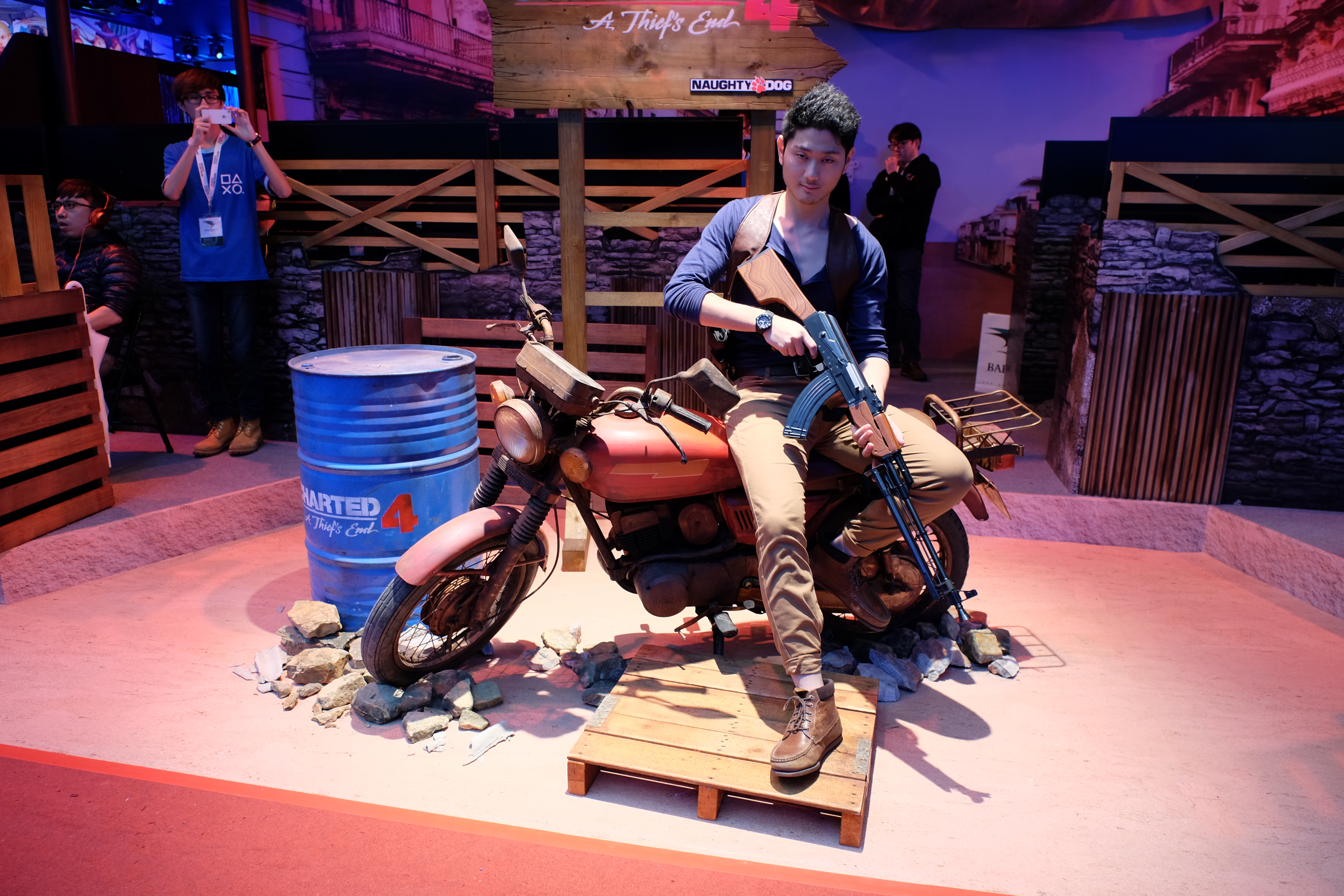 2016臺北國際電玩展第五日下午，PlayStation攤位扮演頑皮狗《秘境探險4 盜賊末路》主角內森·德瑞克的模特兒。